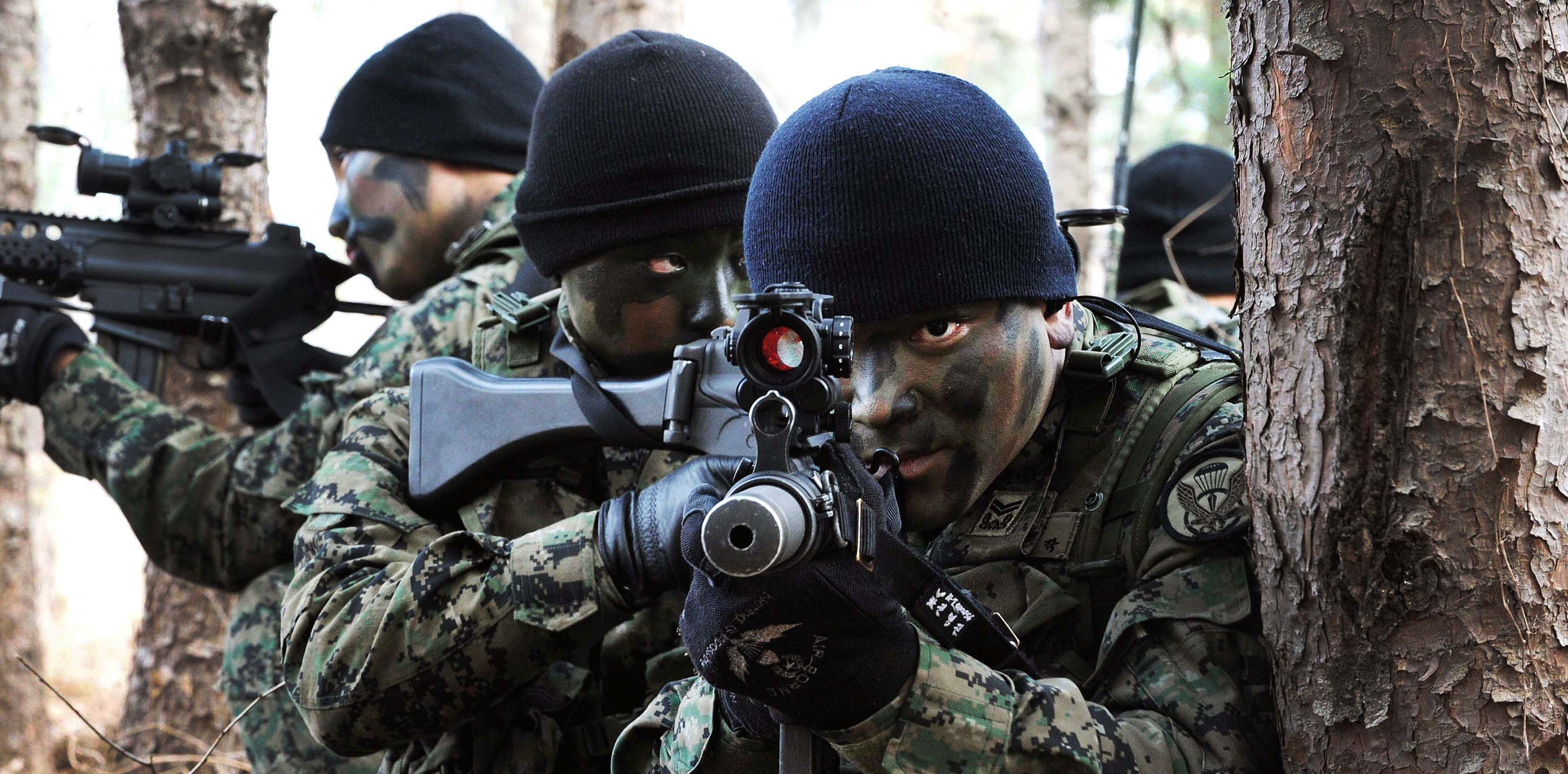 17일 육군특수전사령부 3공수특전여단 장병들이 검단산 일대에서 탐색격멸훈련을 펼치고 있다. 중대장이 조장들에게 하달한 명령에 따라 장병들이 새로 보급된 개인화기 주야 조준경을 이용해 가상의 적을 추적하고 있다. 촬영 - 김태형 기자